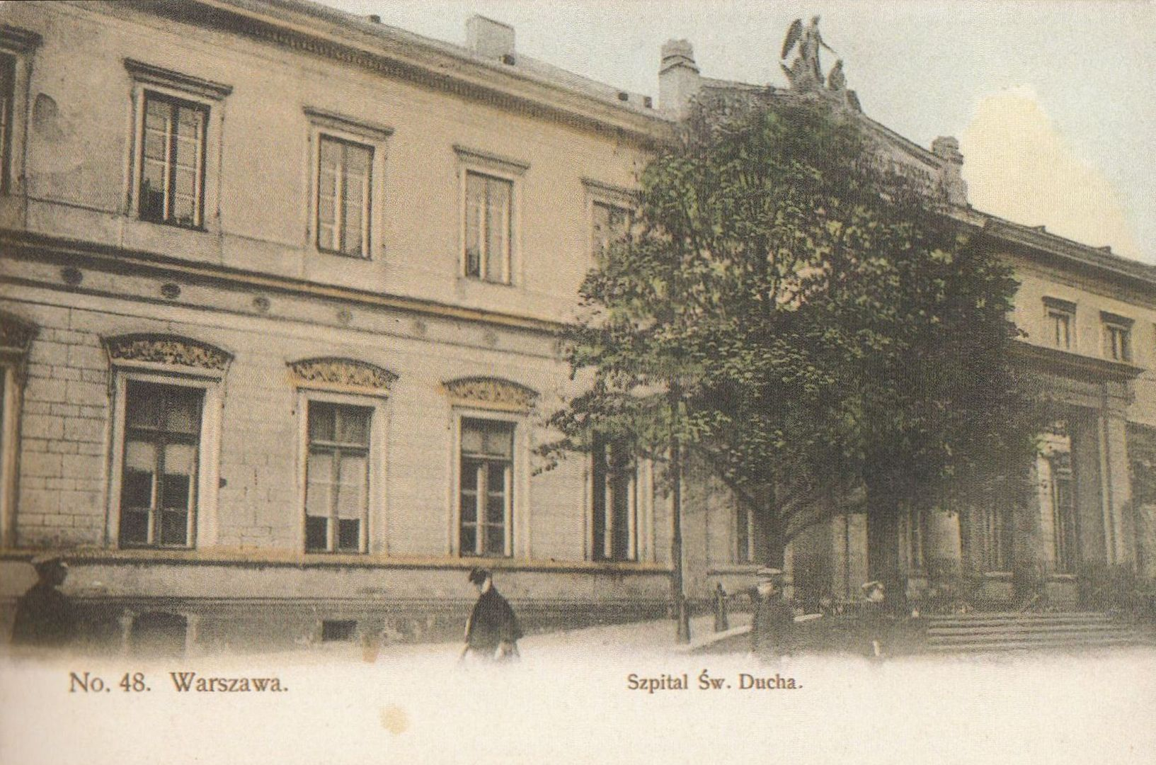 Szpital św. Ducha przy ul. Elektoralnej w Warszawie